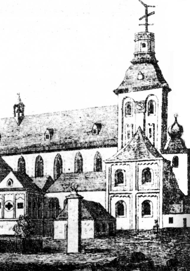 Köln, St. Pantaleon um 1832 Optische Telegraphie No 51